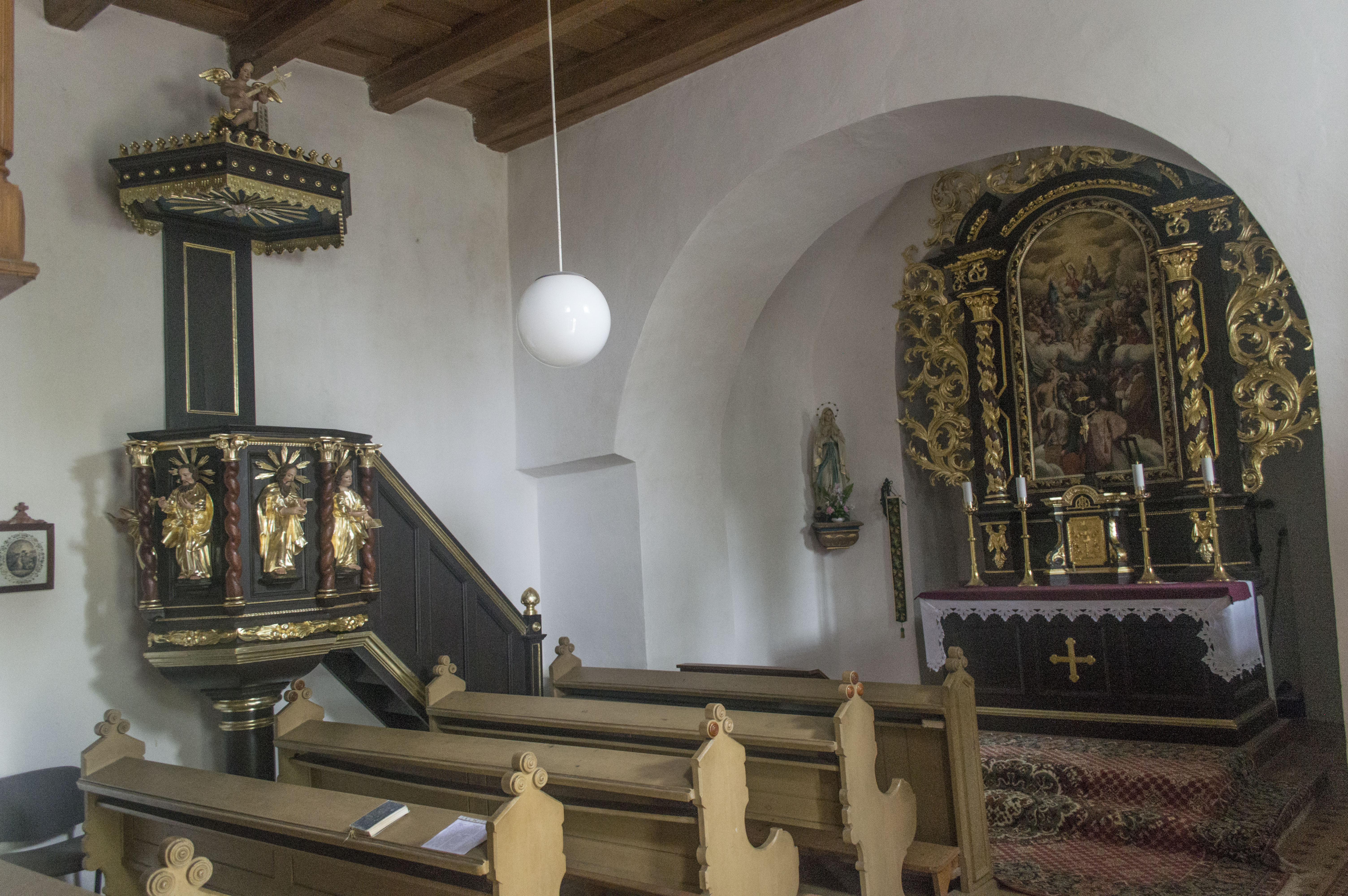 Interiér kostela s kazatelnou a oltářem po restaurování.